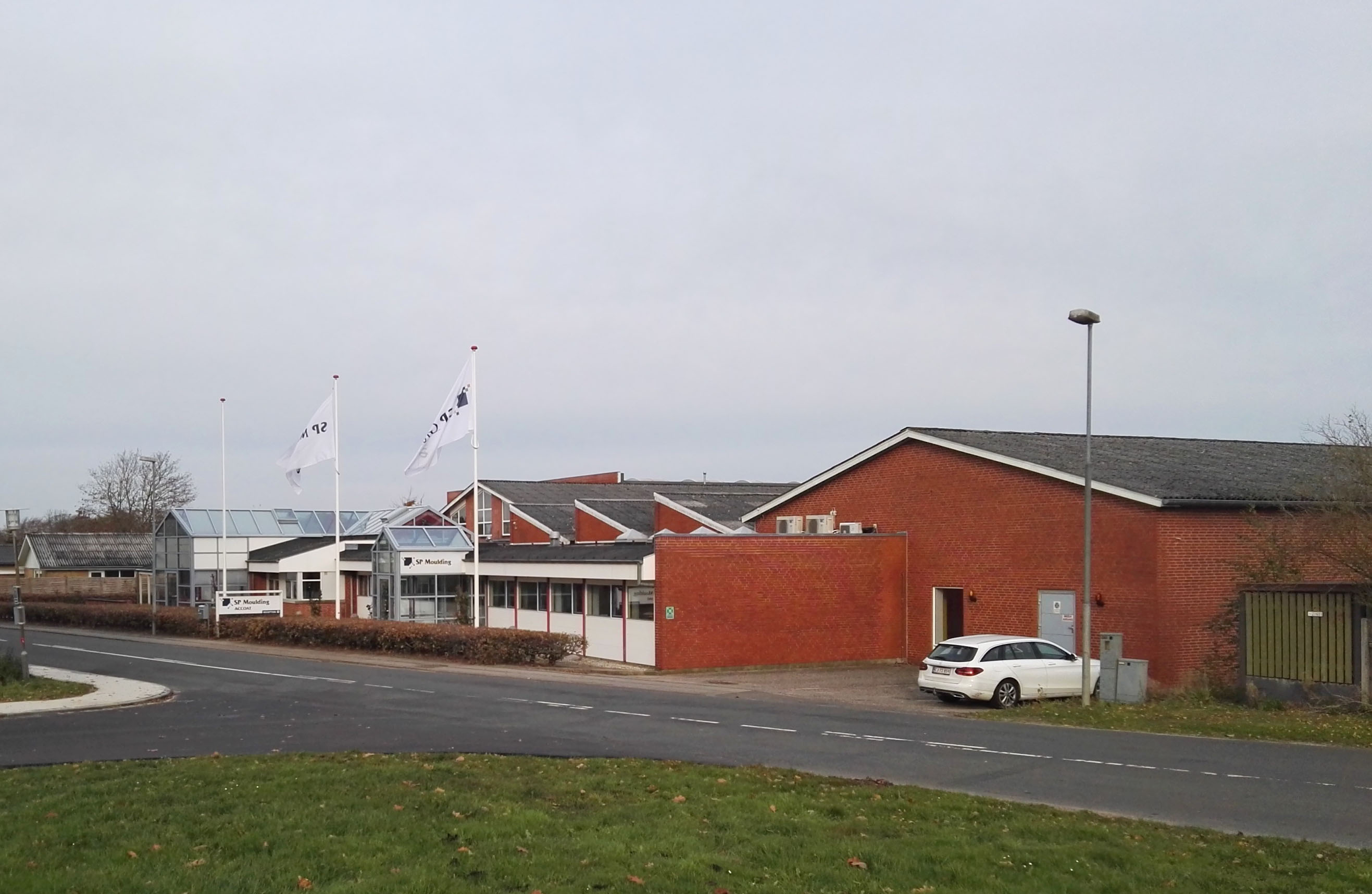 Indkørsel til SP Moulding og Accoat i Stoholm